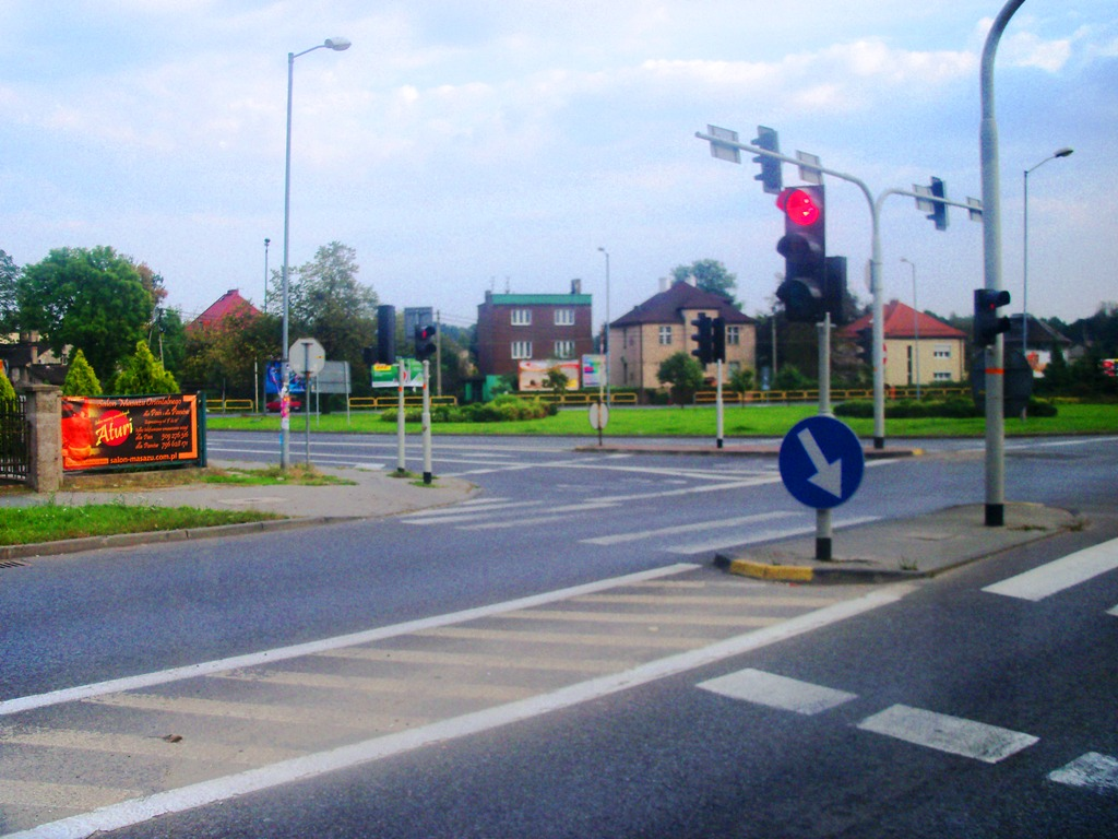 skrzyżowanie ulic Kościuszki i Brynowskiej w Katowicach-Brynowie